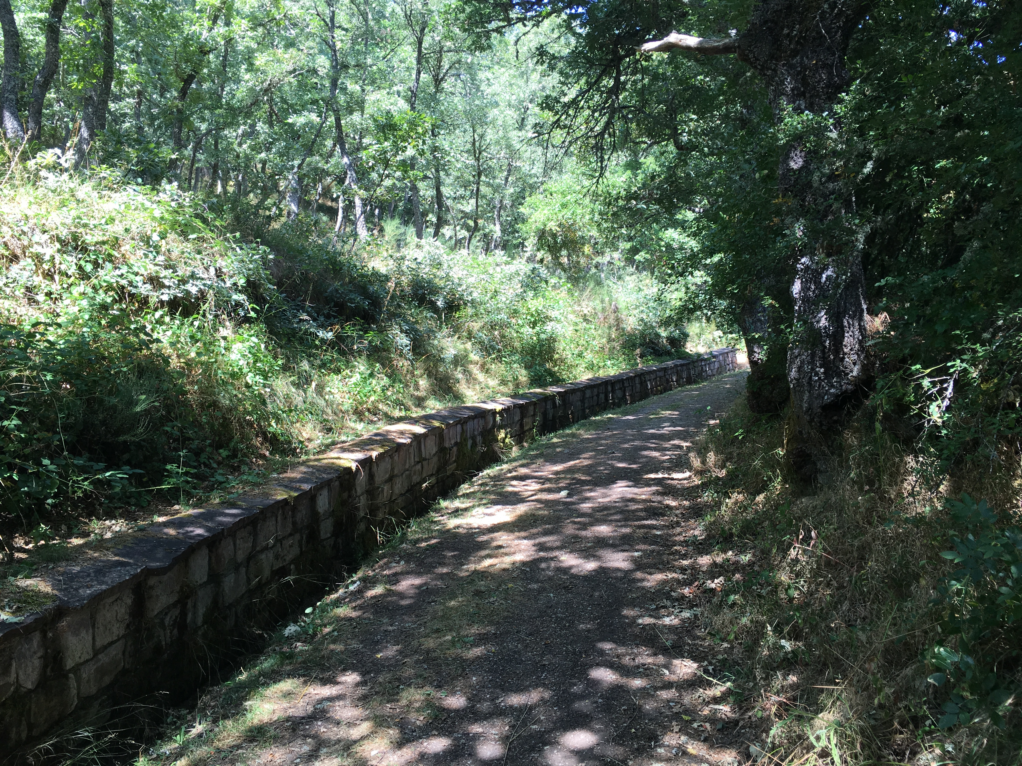 Ruta señalizada hacia el bosque fósil. Verdeña, Cervera de Pisuerga, Palencia, Castilla-León, Spain.